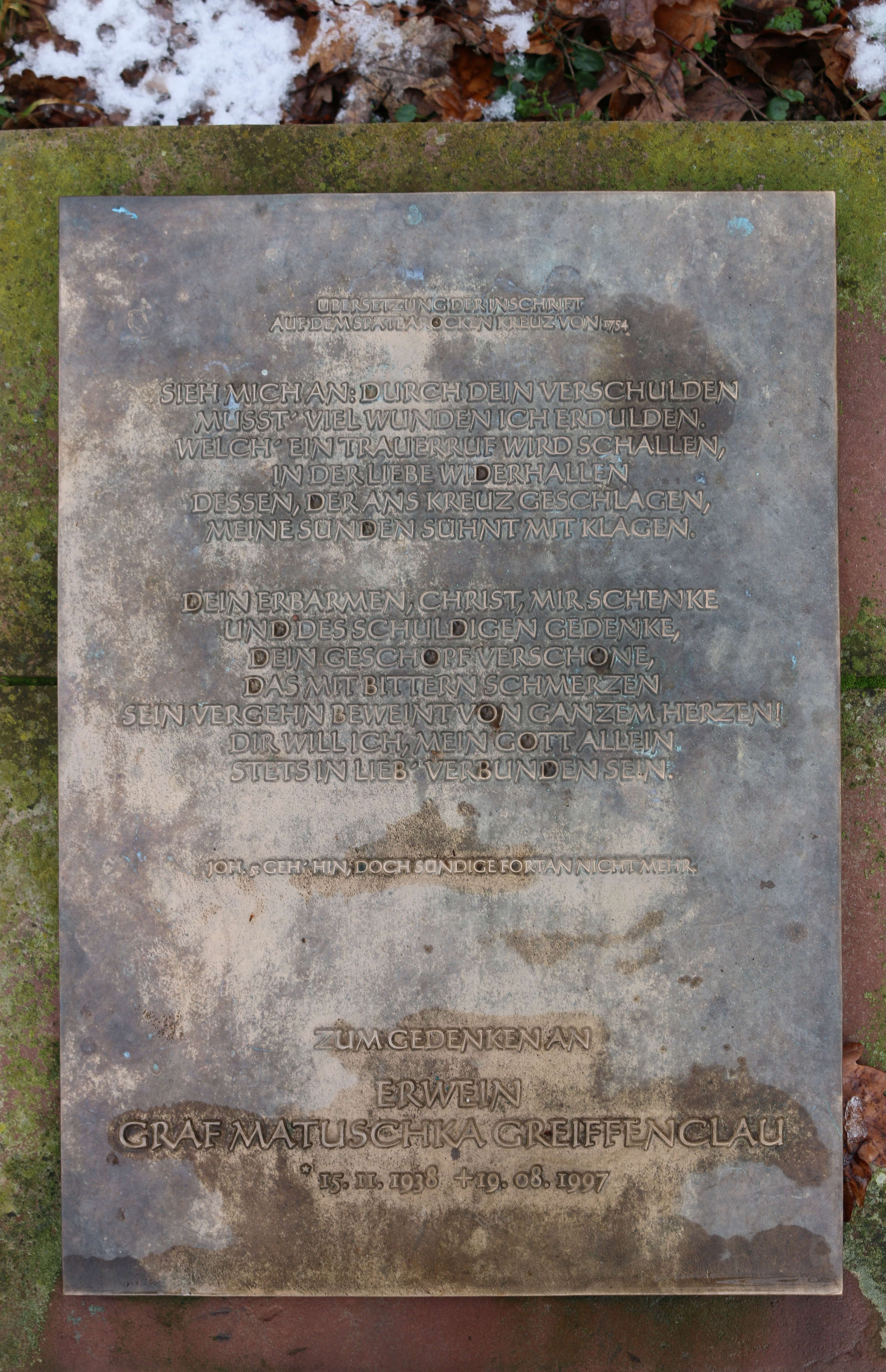 Winkel, Rheingau: Gedenktafel für Matuschka Graf Greiffenclau beim Kreuz auf dem Greiffenberg